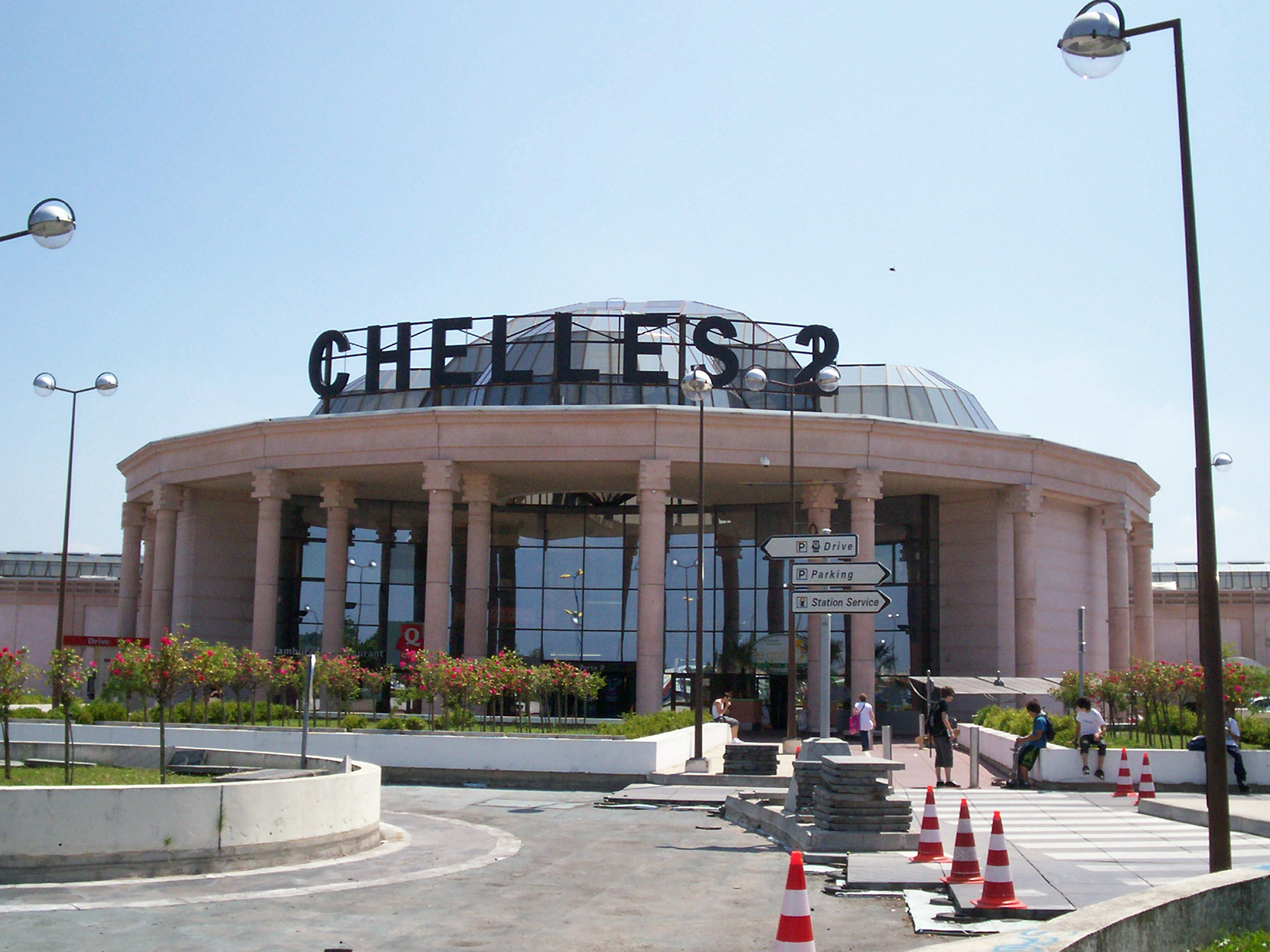 Porte 2 de Chelles2